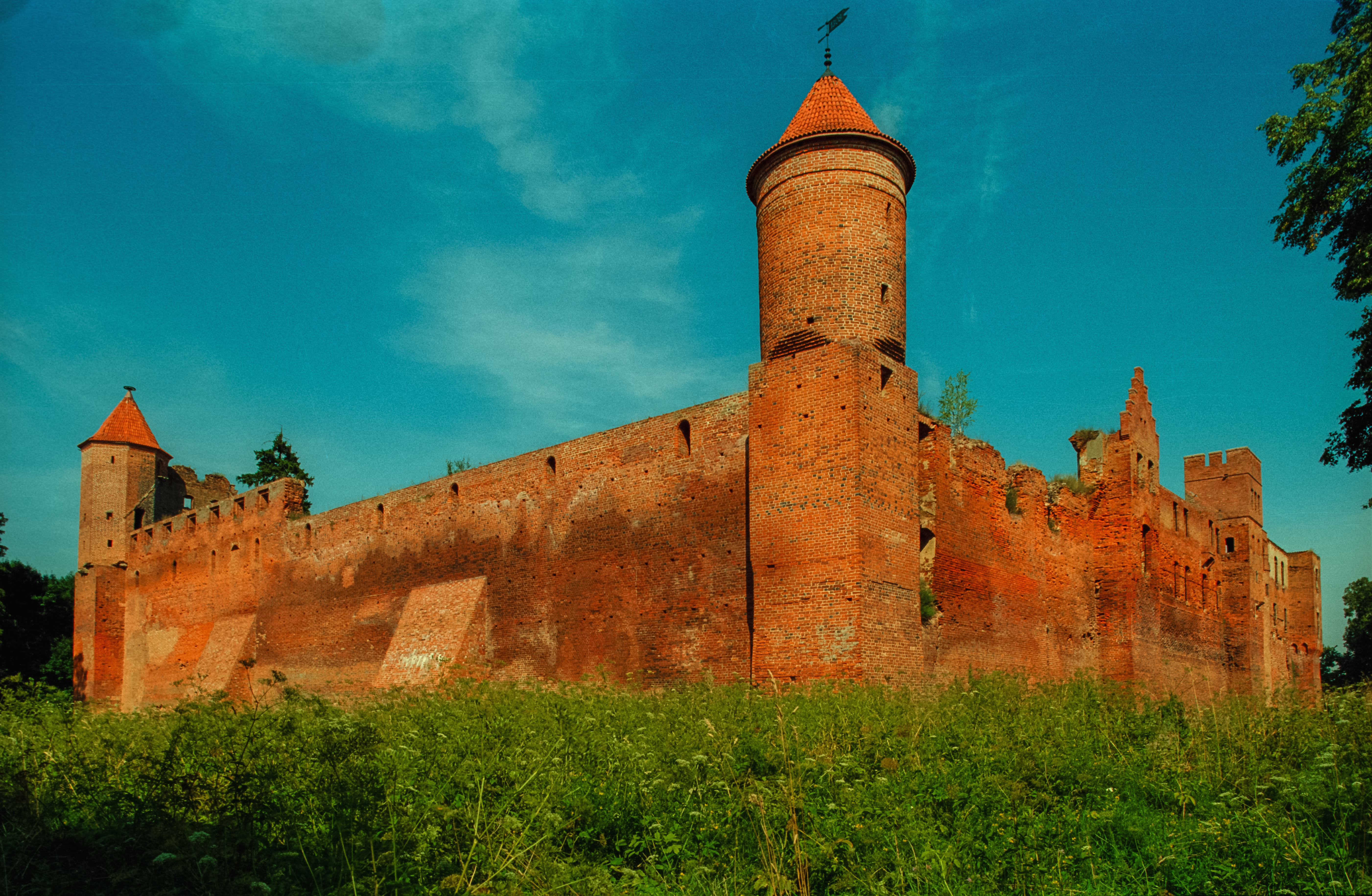 Szymbark Castle